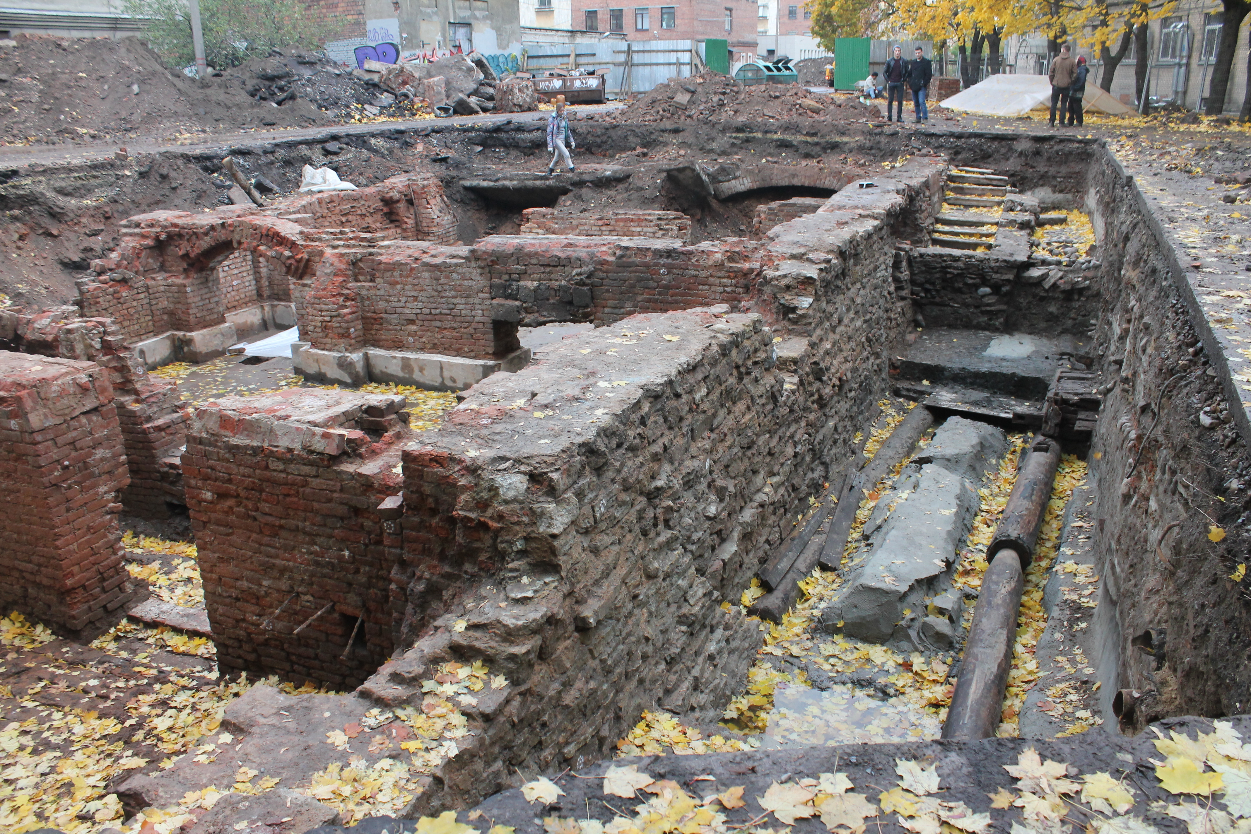 Участок сохранившегося культурного слоя, вмещающий архитектурные остатки Владимирского пассажа Ново-Александровского рынка, построенного в 1867 г. по проекту арх. А.К. Бруни: Вознесенский проспект, 44-46, двор (квартал, образованный переулком Бойцова, набережной р. Фонтанки, Вознесенским проспектом и Садовой улицей), Адмиралтейский район, Санкт-Петербург